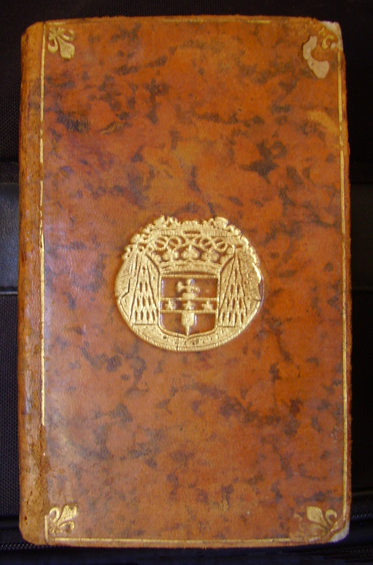 Reliure d'un ouvrage donné comme prix au collège des Quatre-Nations (Paris)